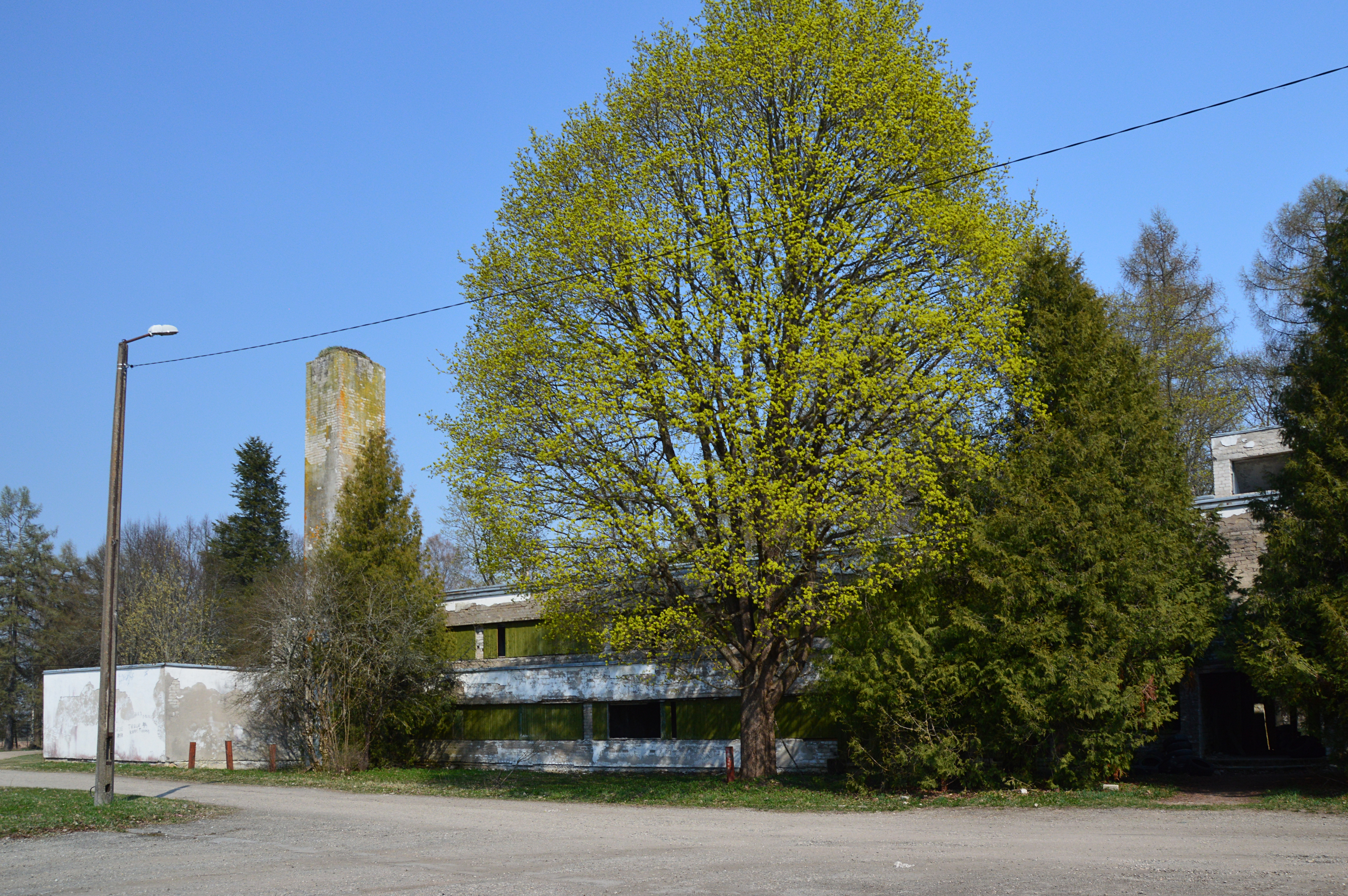 Tsooru kolhoosikeskuse varemed